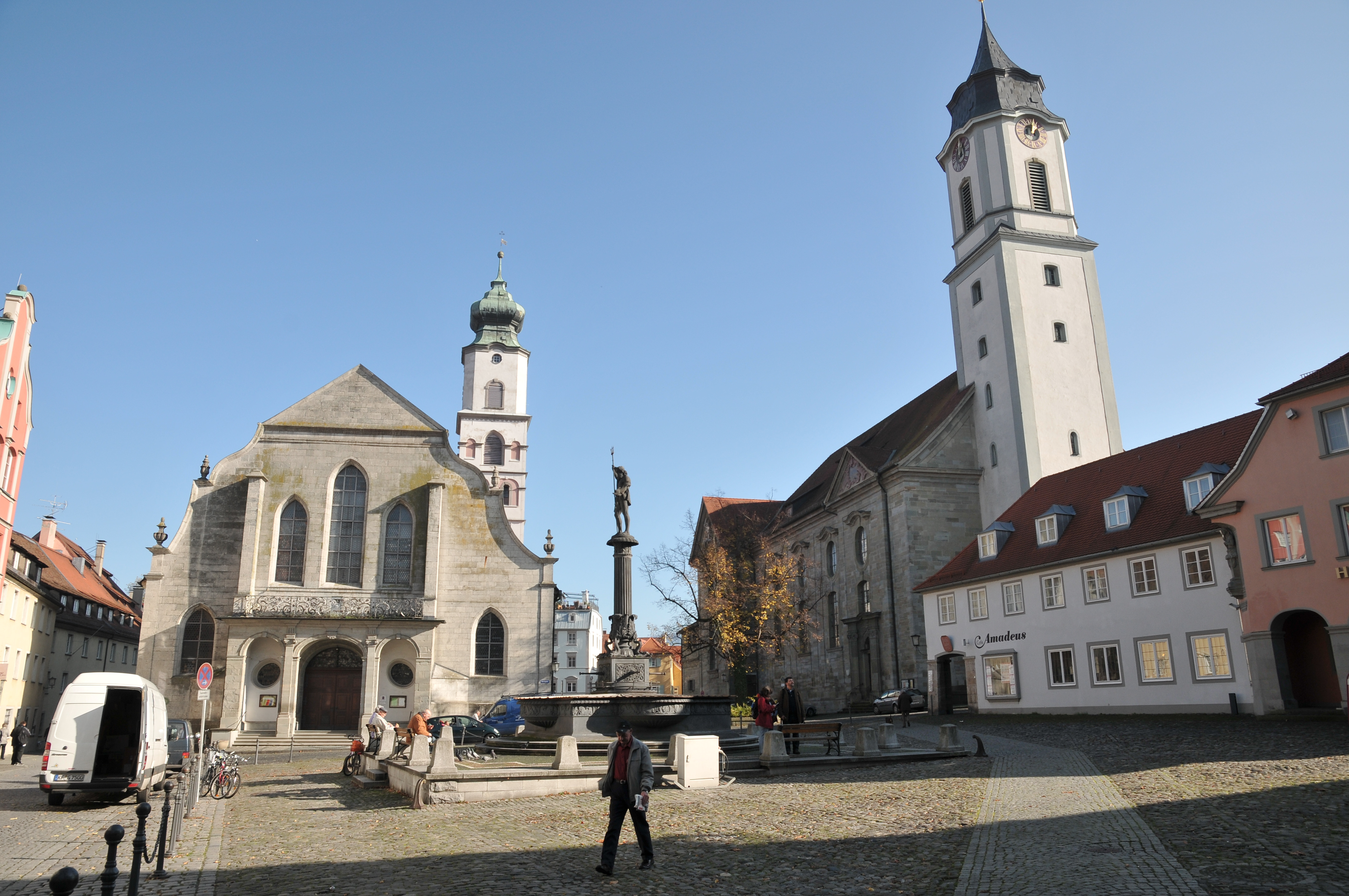 St. Stephan / Stiftskirche in Lindau (Bodensee) links und Münster Unserer Lieben Frau (rechts)